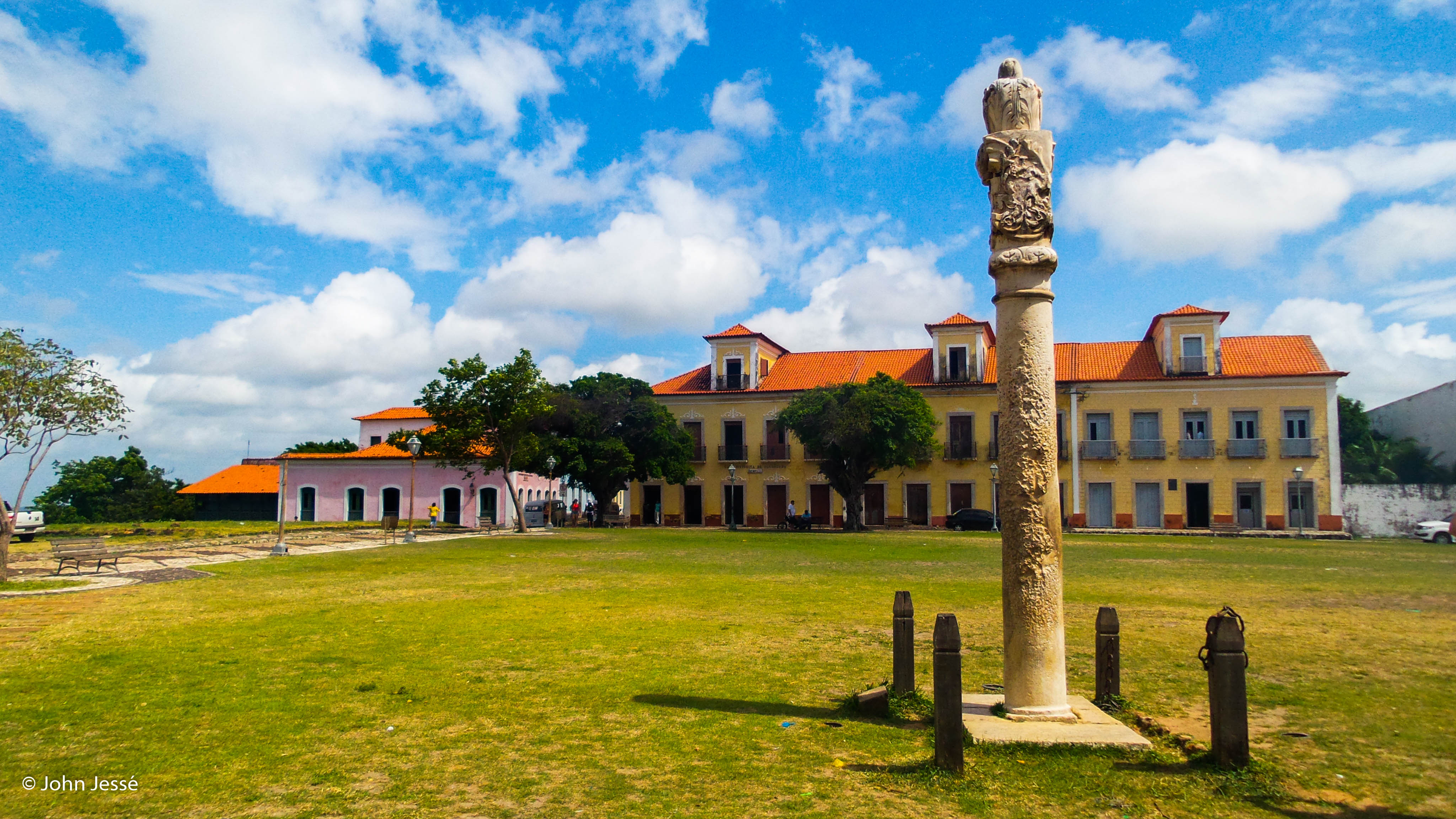 O pelourinho de Alcântara é mesmo um precioso elemento da História. Prazeroso fazer as fotos.